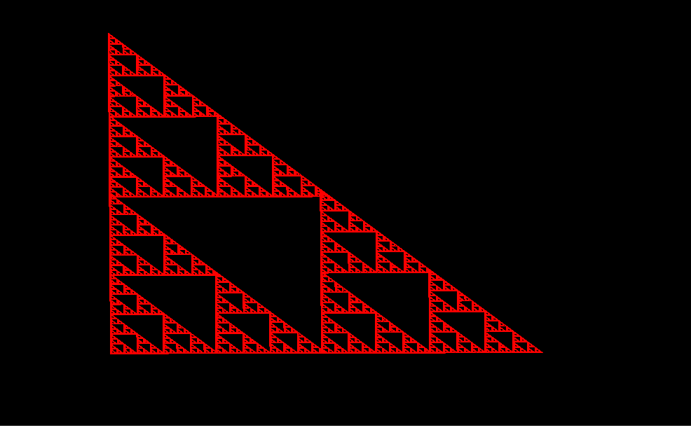 créé sous apophysis